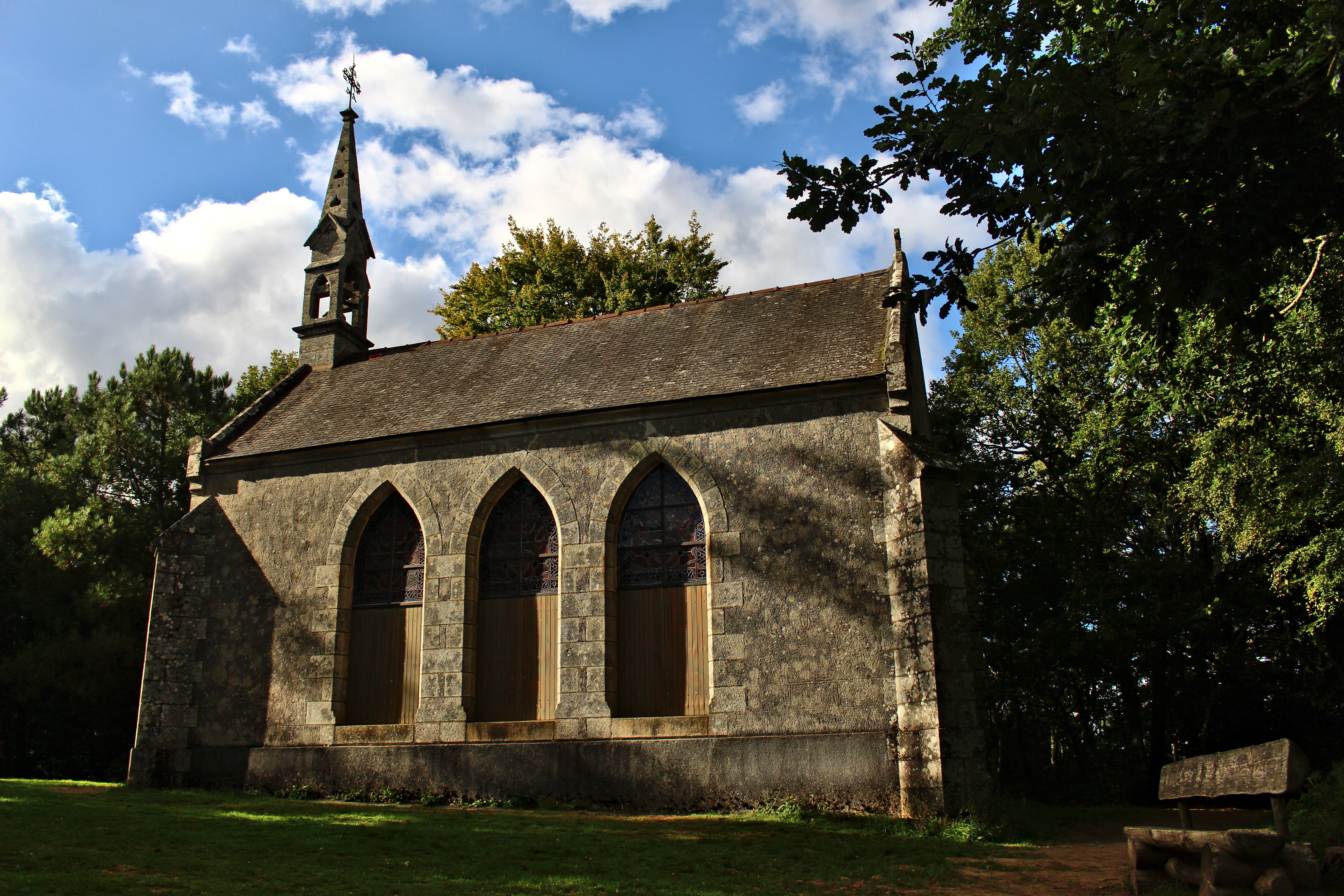 Chapelle Sainte-Tréphine (Saint-Aignan) - Construite entre mars 1897 et mai 1898 et créée à l'initiative de l'abbé Ollichon, recteur de la paroisse de Saint-Aignan de 1892 à 1899.